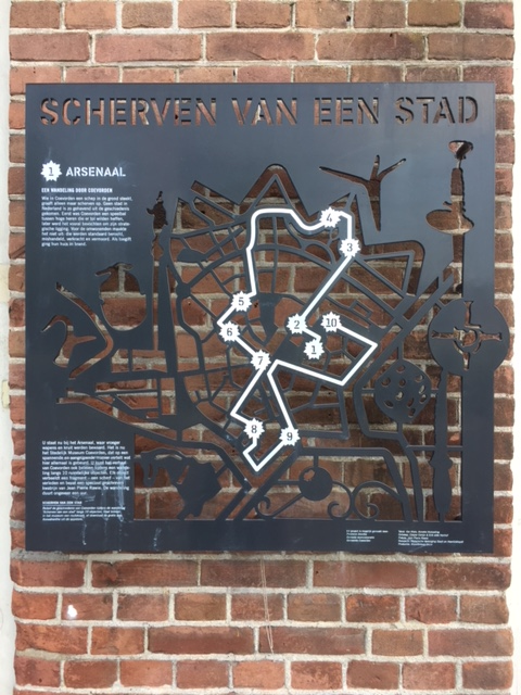 Wandelroute langs de historische plaatsen van Coevorden. Compleet met tekst, historische weetjes, plaatjes en kaarten.